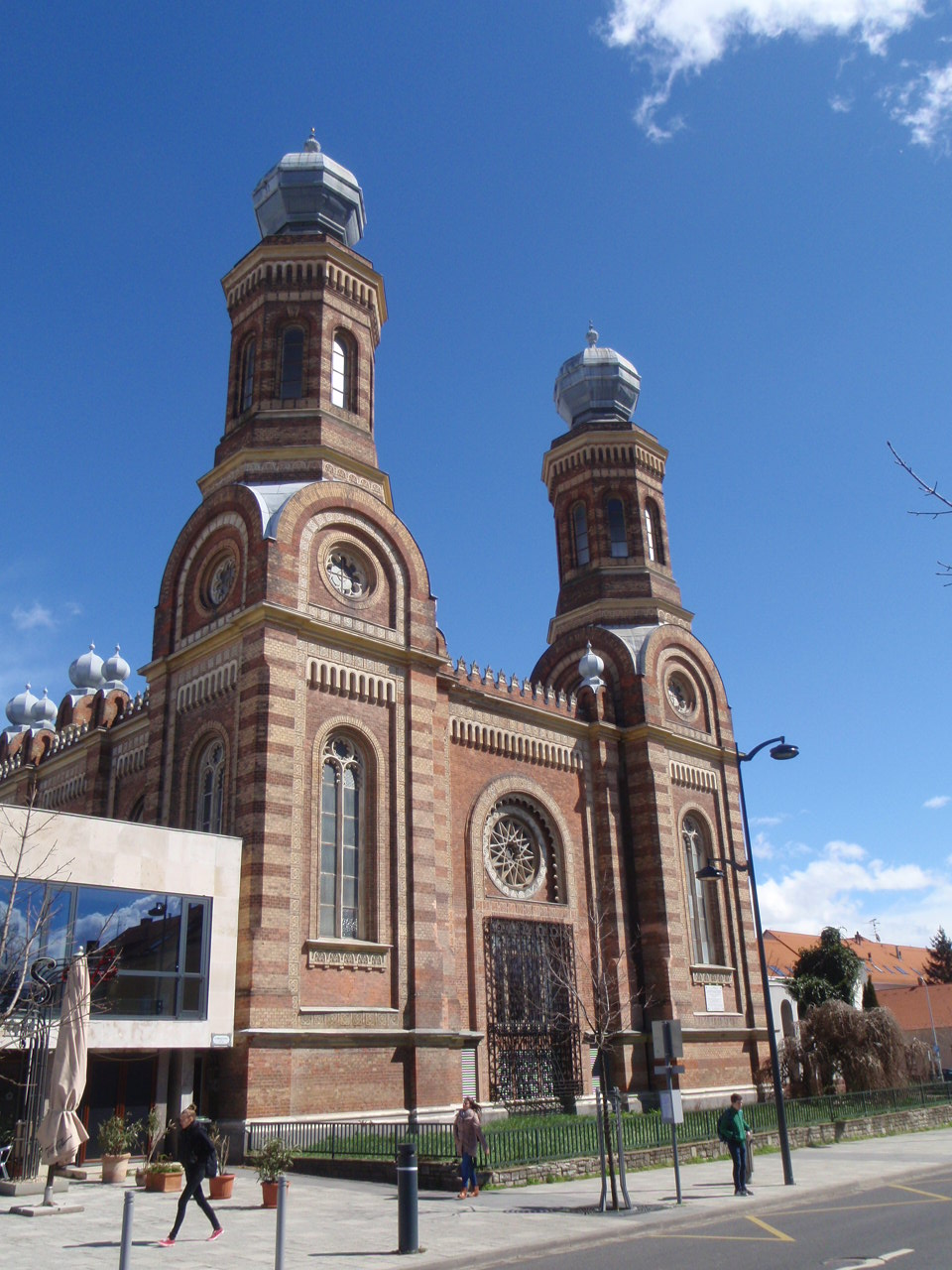 Szombathely Zsinagóga Rákóczi utca